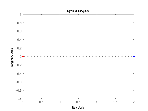 Nyquist Diagram (P, K = 2)